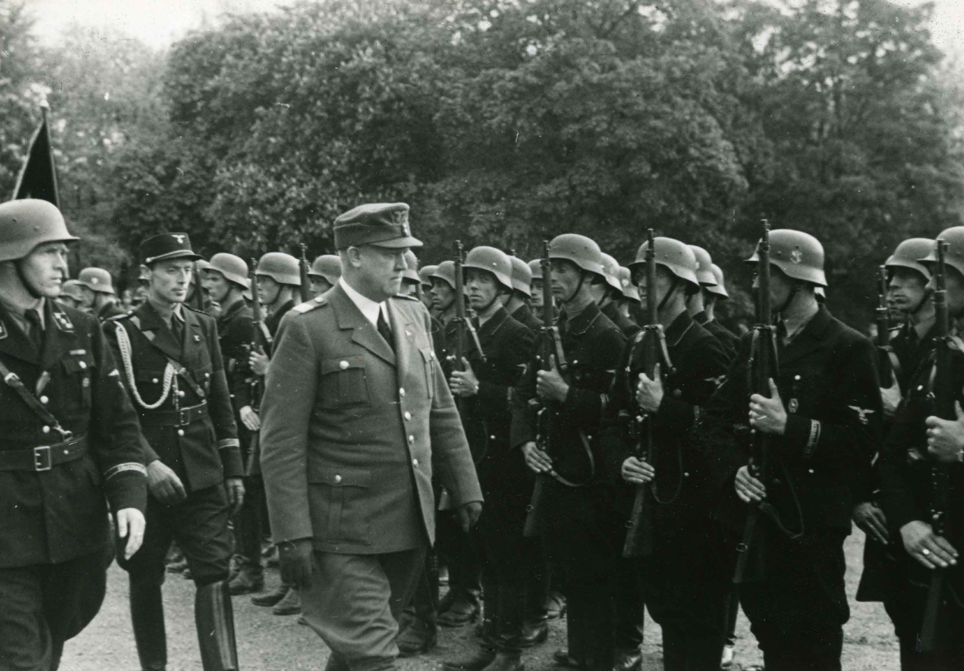 Ukjent datering. RA/PA-0781/Fe/0005/0794 1204